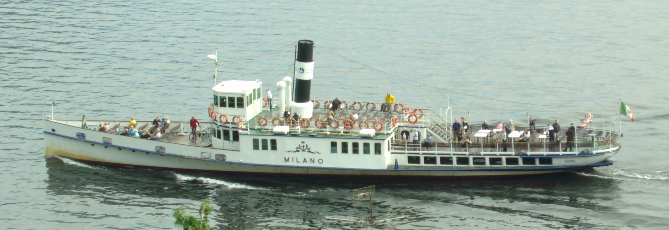 Battello Milano in navigazione verso ArgegnoEsperanto: Ŝipo Milano navigas apud Argegno.